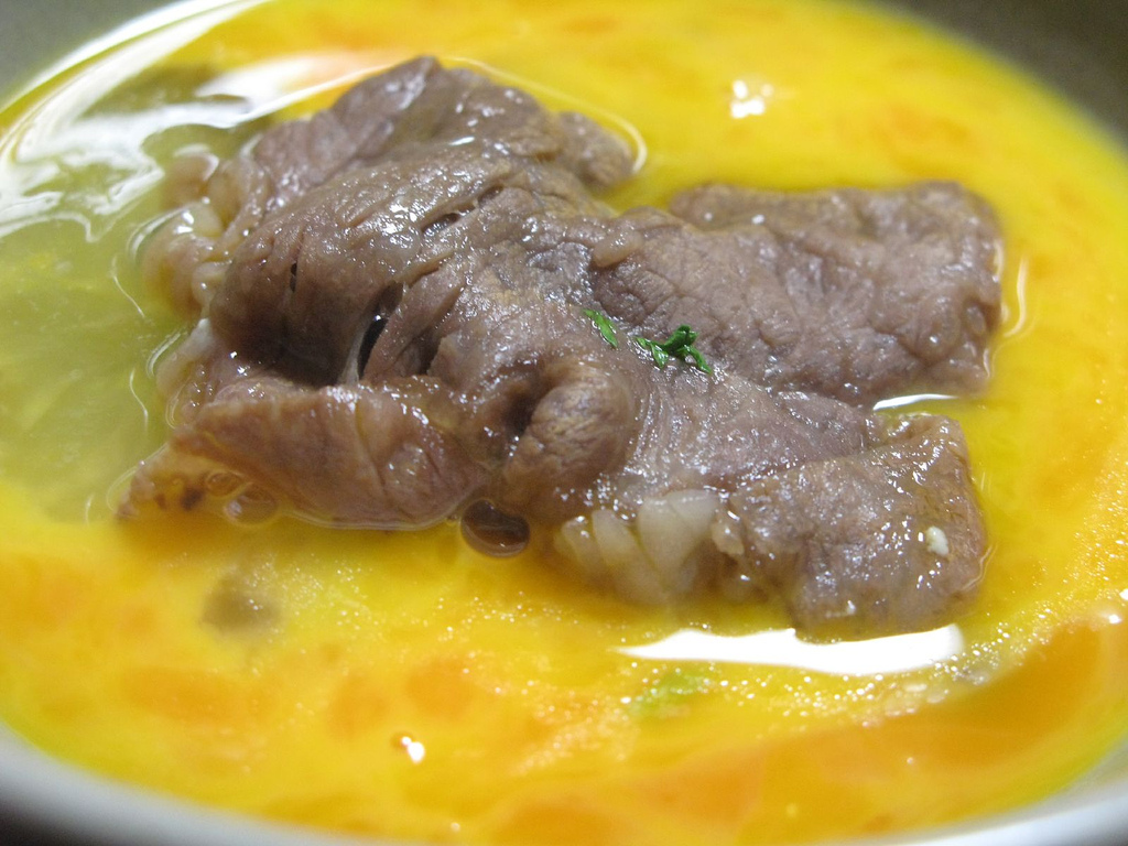 Sukiyaki at Kumi's